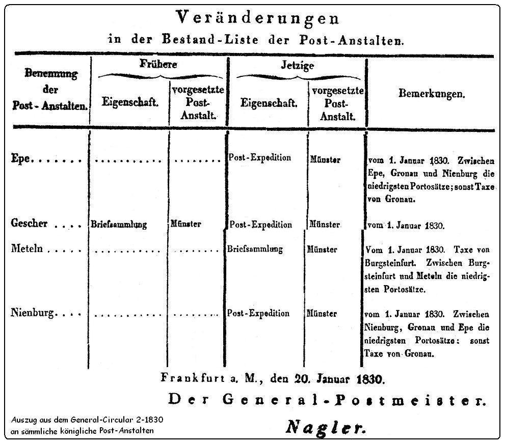 Auszug aus den preussischen General Circularen